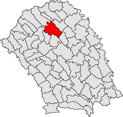 Categorie:Hărţi ale judeţului Botoşani